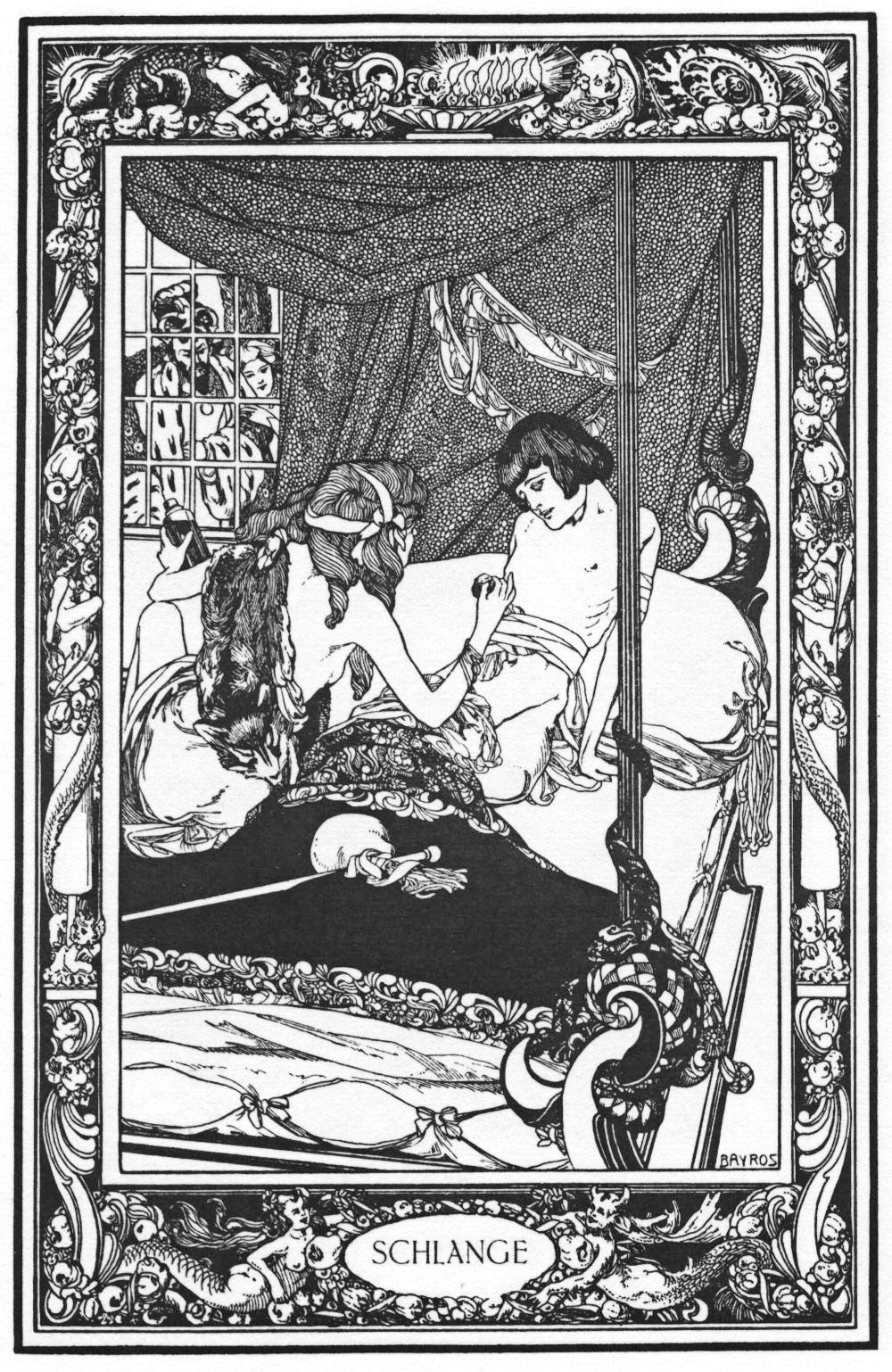 Illustration for Giambattista Basile's "Pentamerone".